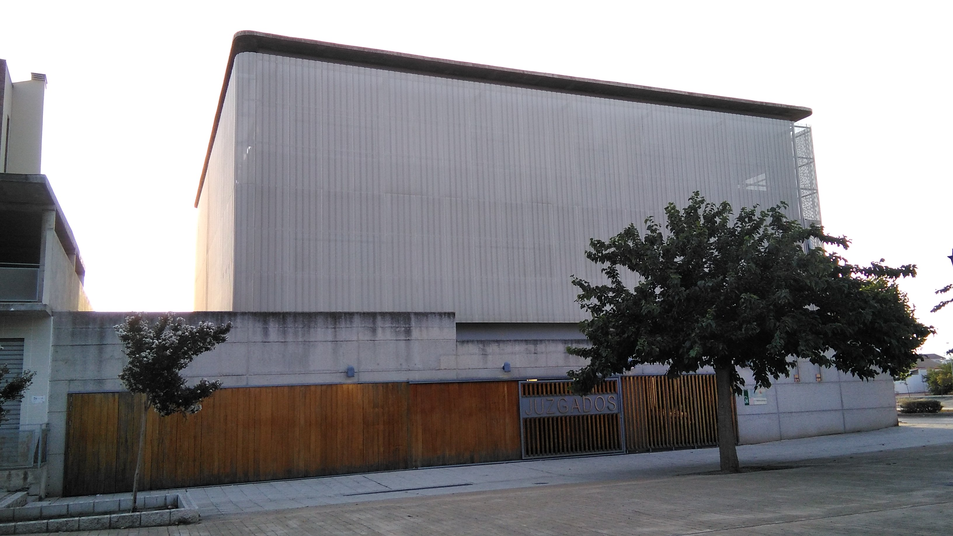 Sede del Partido judicial de Santa Fe.